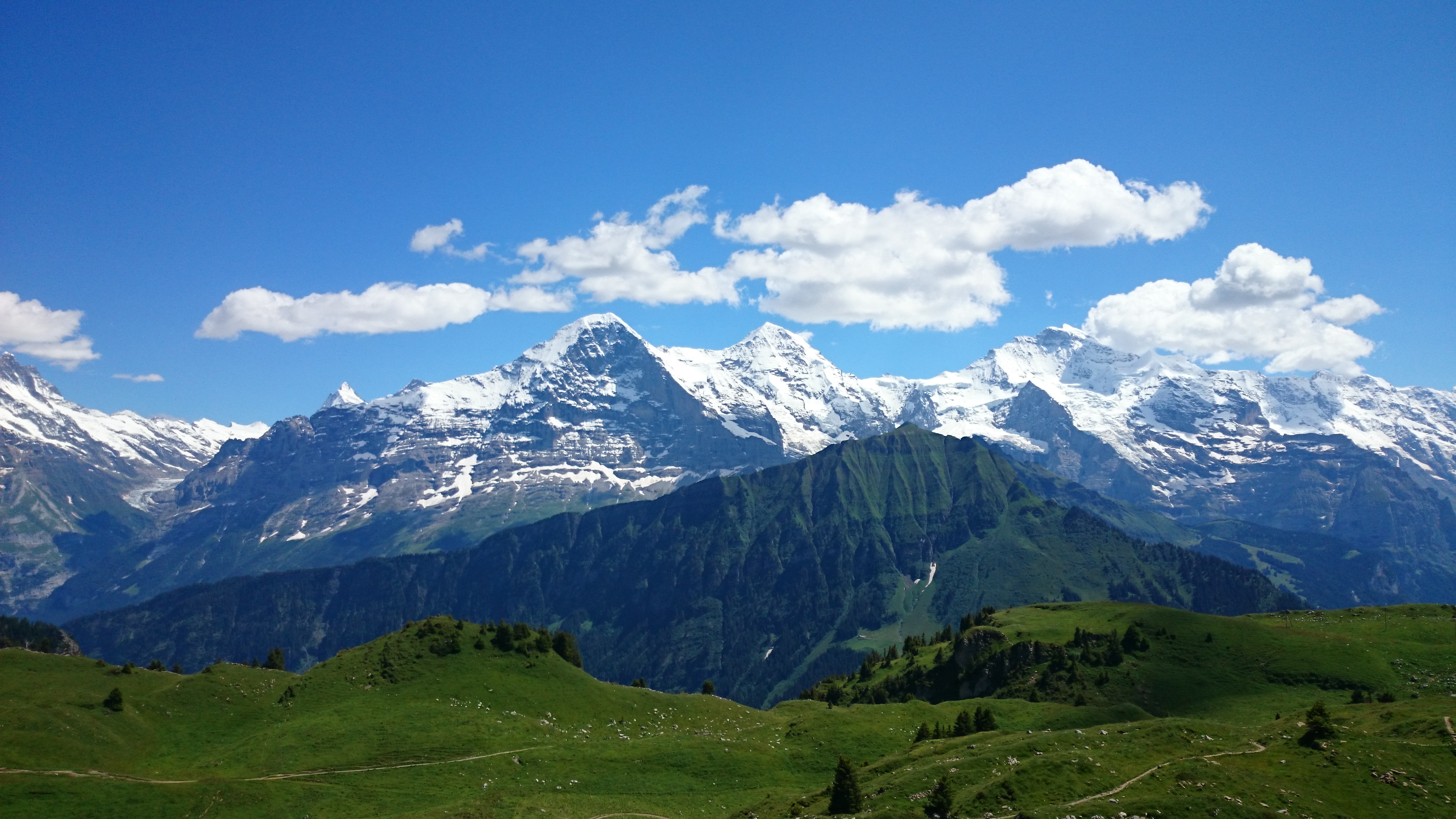 Eiger, Mönch and Jungfrau view from Schynige Platte.